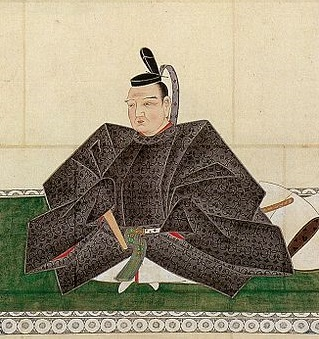 水戸徳川博物館所蔵の狩野常信筆による徳川光圀像（部分）